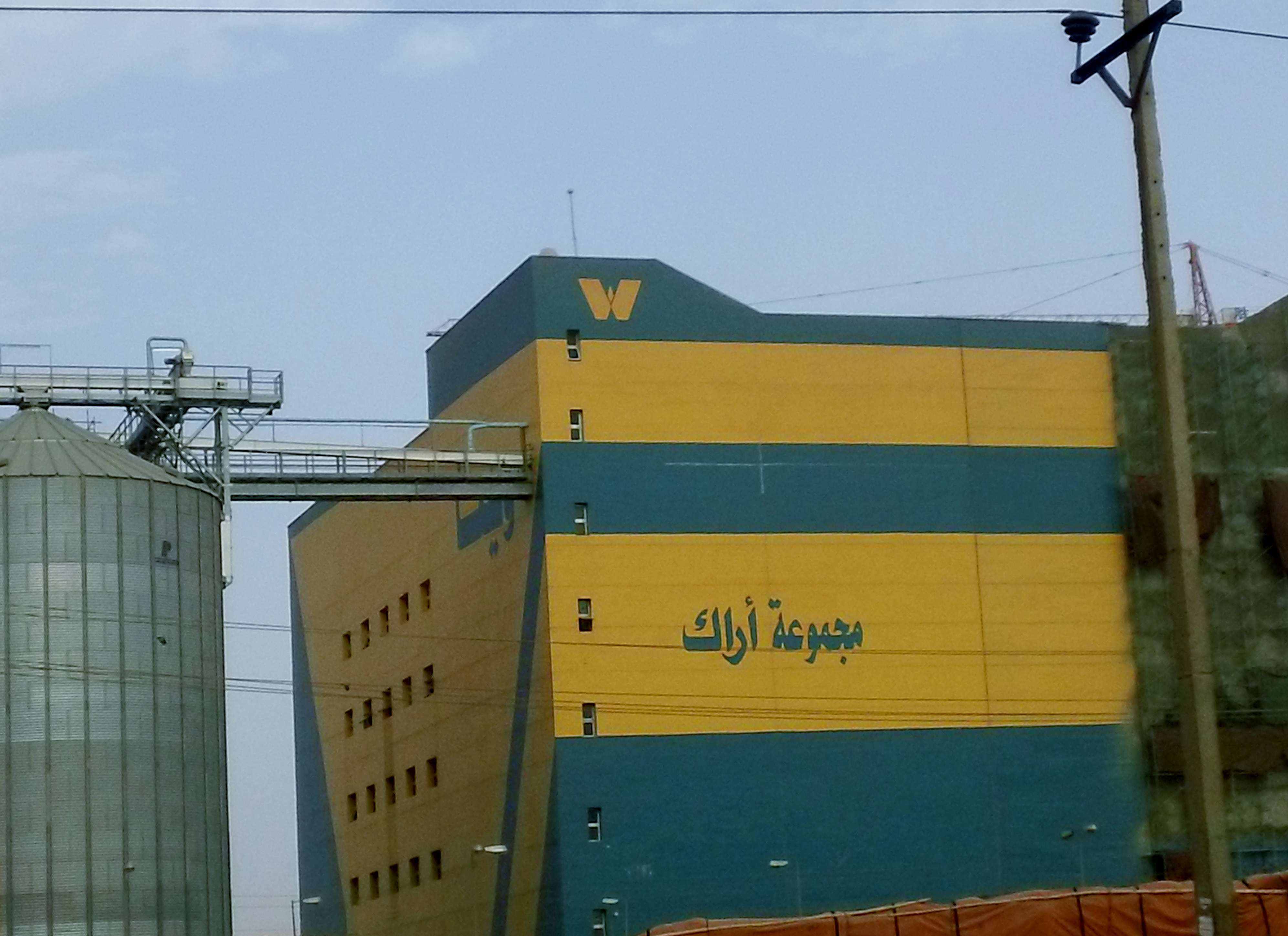 Arak group - Khartoum Bahari - Sudan